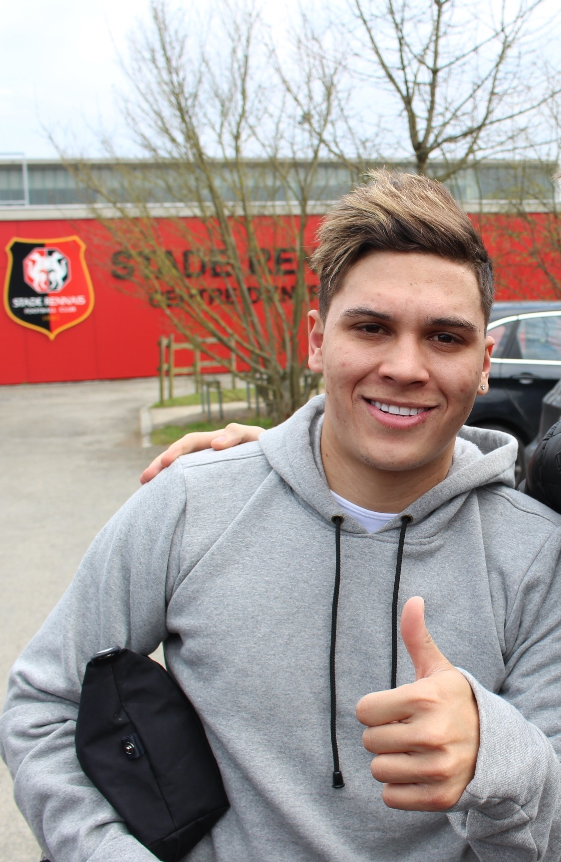 Photo du joueur de balle au pied colombien, Juan Quintero, prise le 16 mars 2016 après un entraînement du Stade Rennais à la Piverdière.